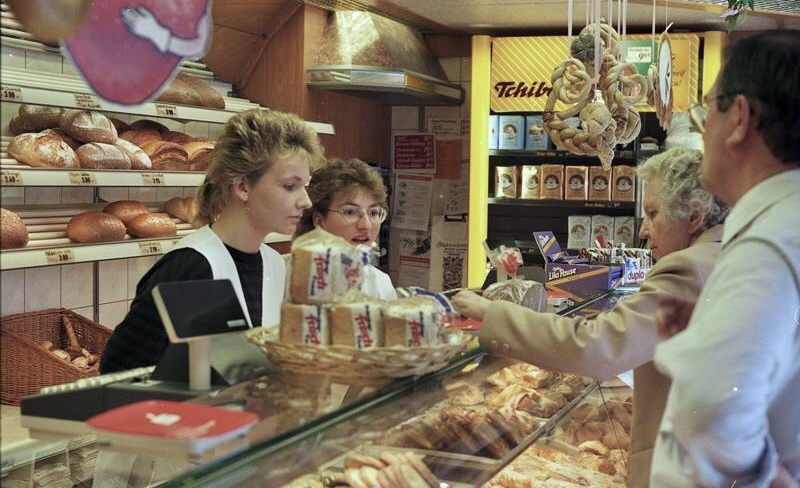 Juni 1988 Göttingen: Bäckerei